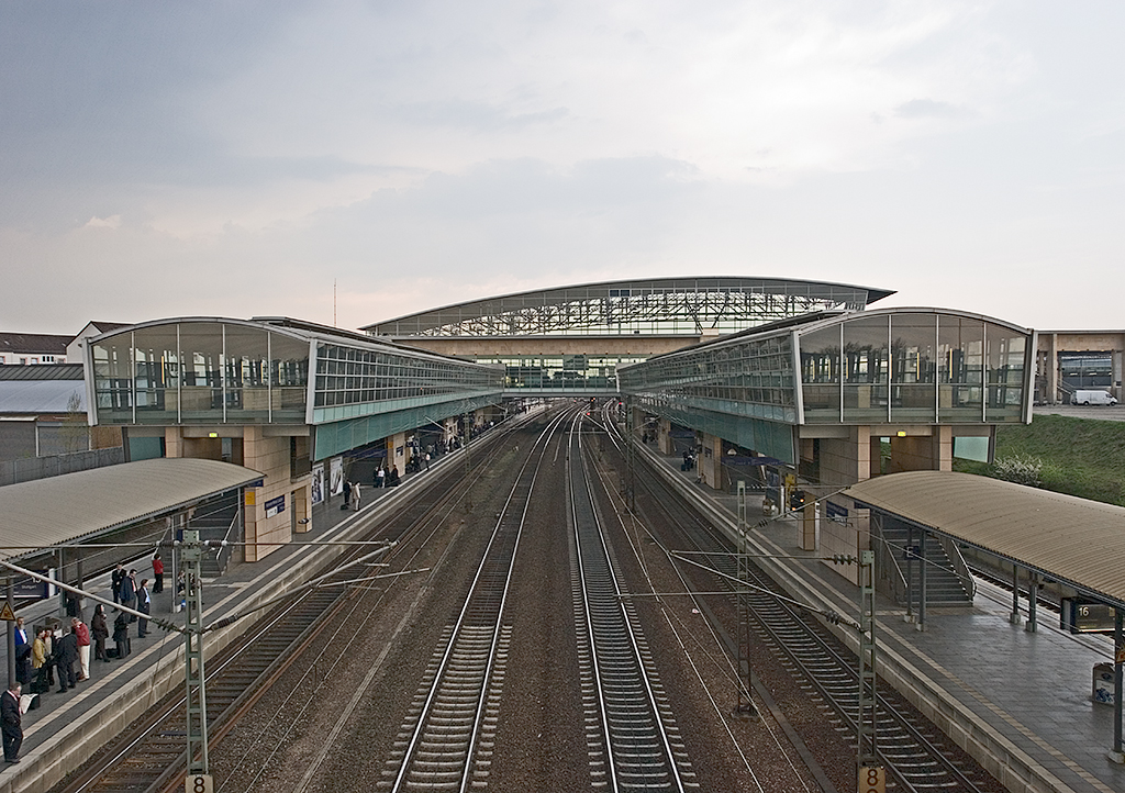 Bahnhof Hannover Messe/Laatzen, April 2005